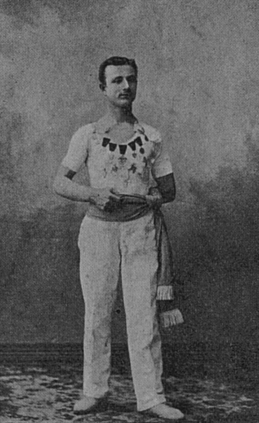 Finnish gymnast Iivari Partanen